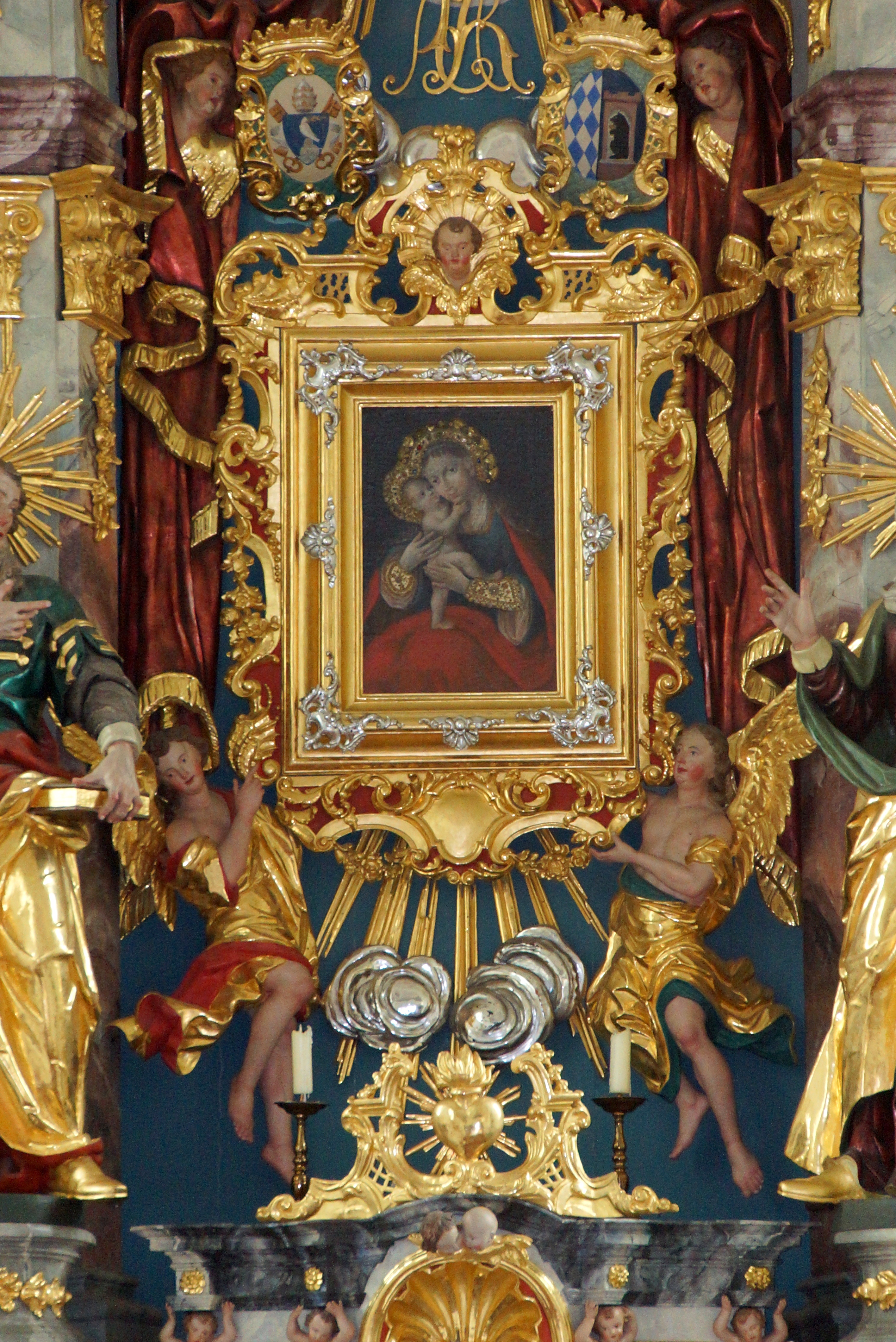 Die katholische Wallfahrtskirche Maria-Hilf im Oberpfälzischen Beratshausen